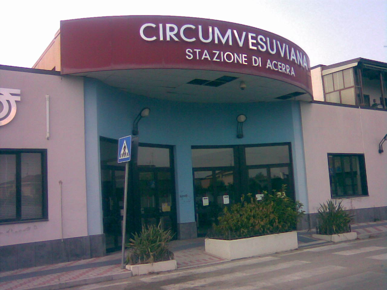 Ingresso della stazione di Acerra della Circumvesuviana